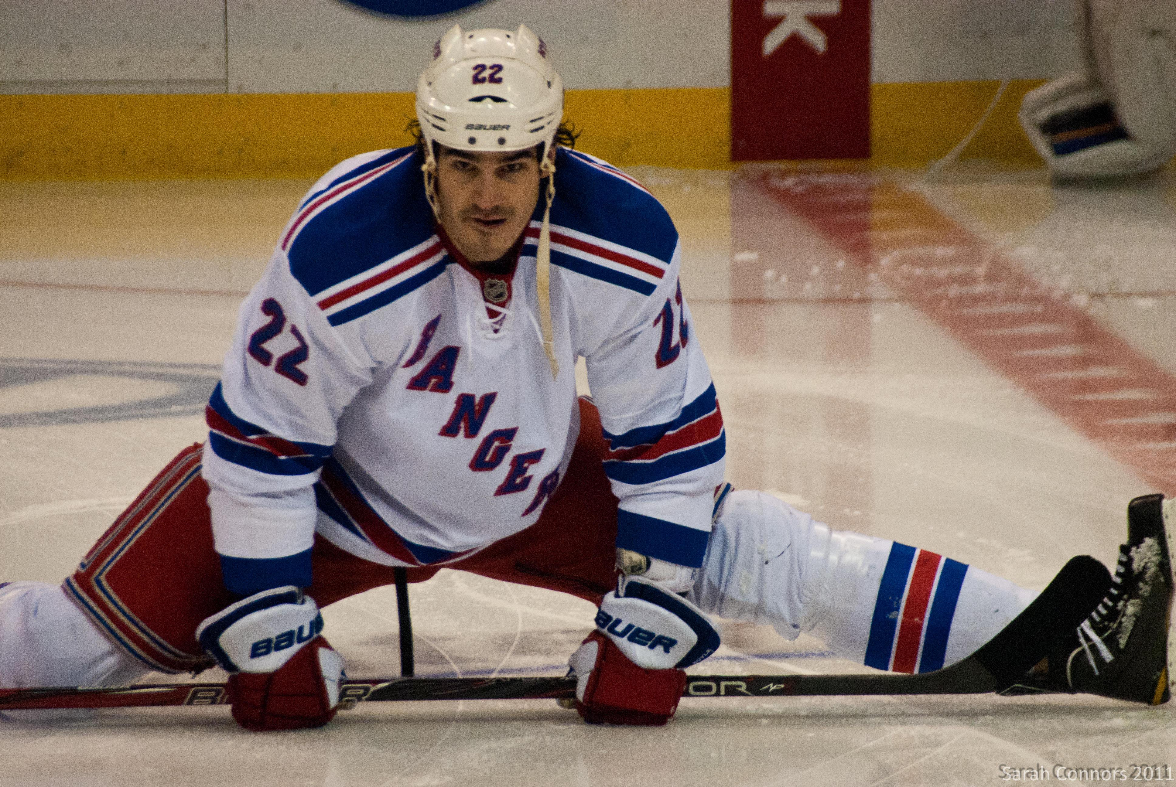 Blues vs. Rangers-8734.jpg